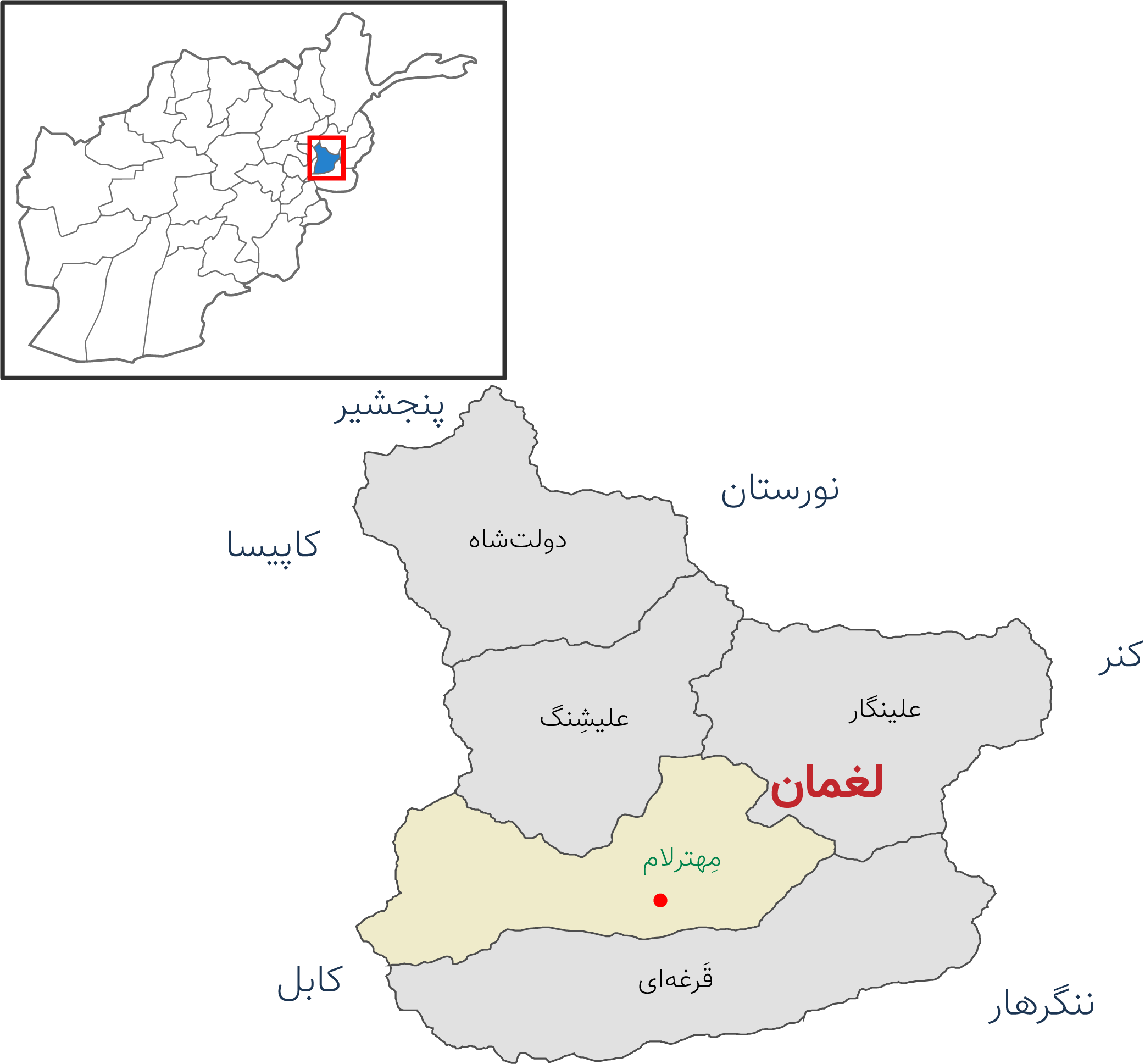 نقشه ولایت لغمان